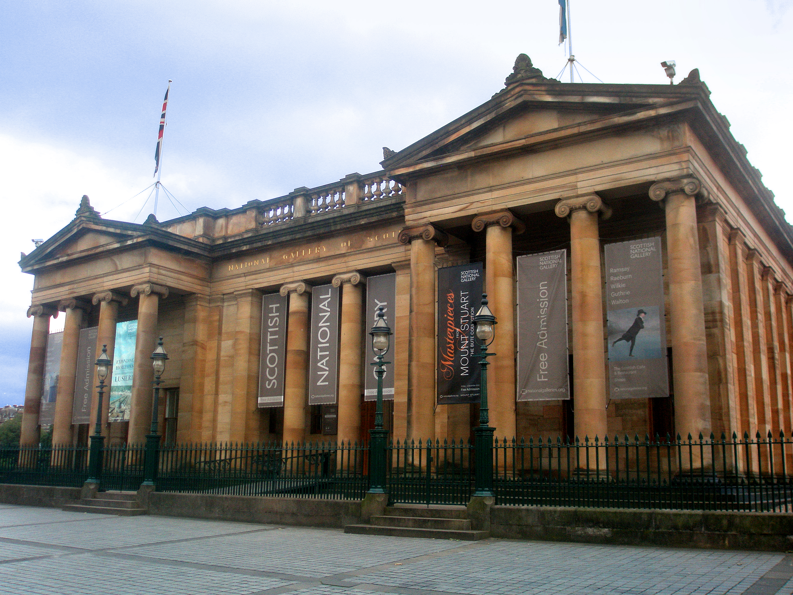 Narodowa Galeria Szkocji.